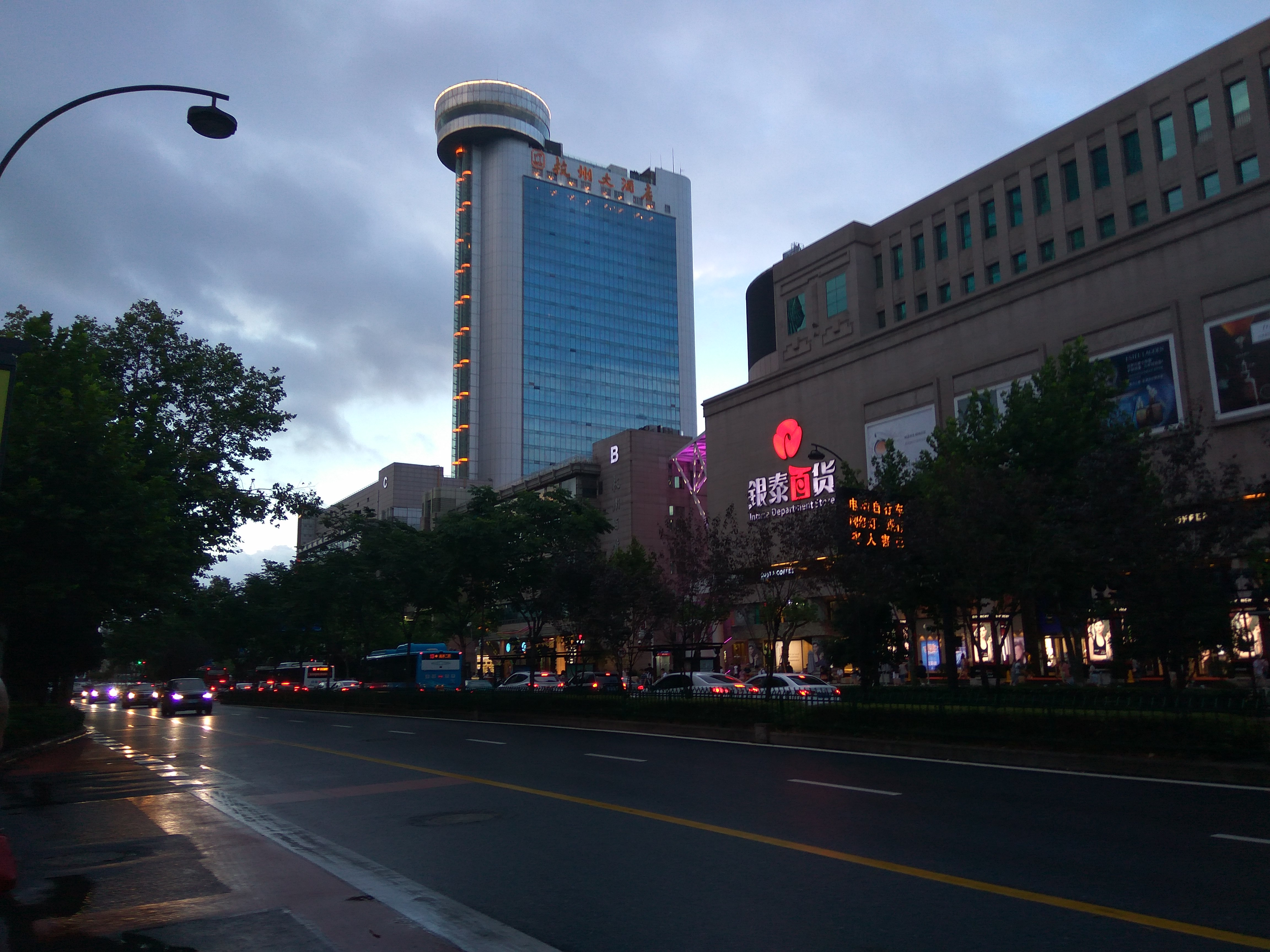 201608 Yan'an Road